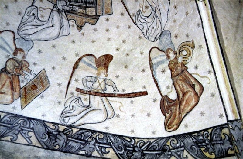 Rynkeby Kirke i Danmark. Nr.29 hakkebræt, nr.30 langleik, nr.31 horn